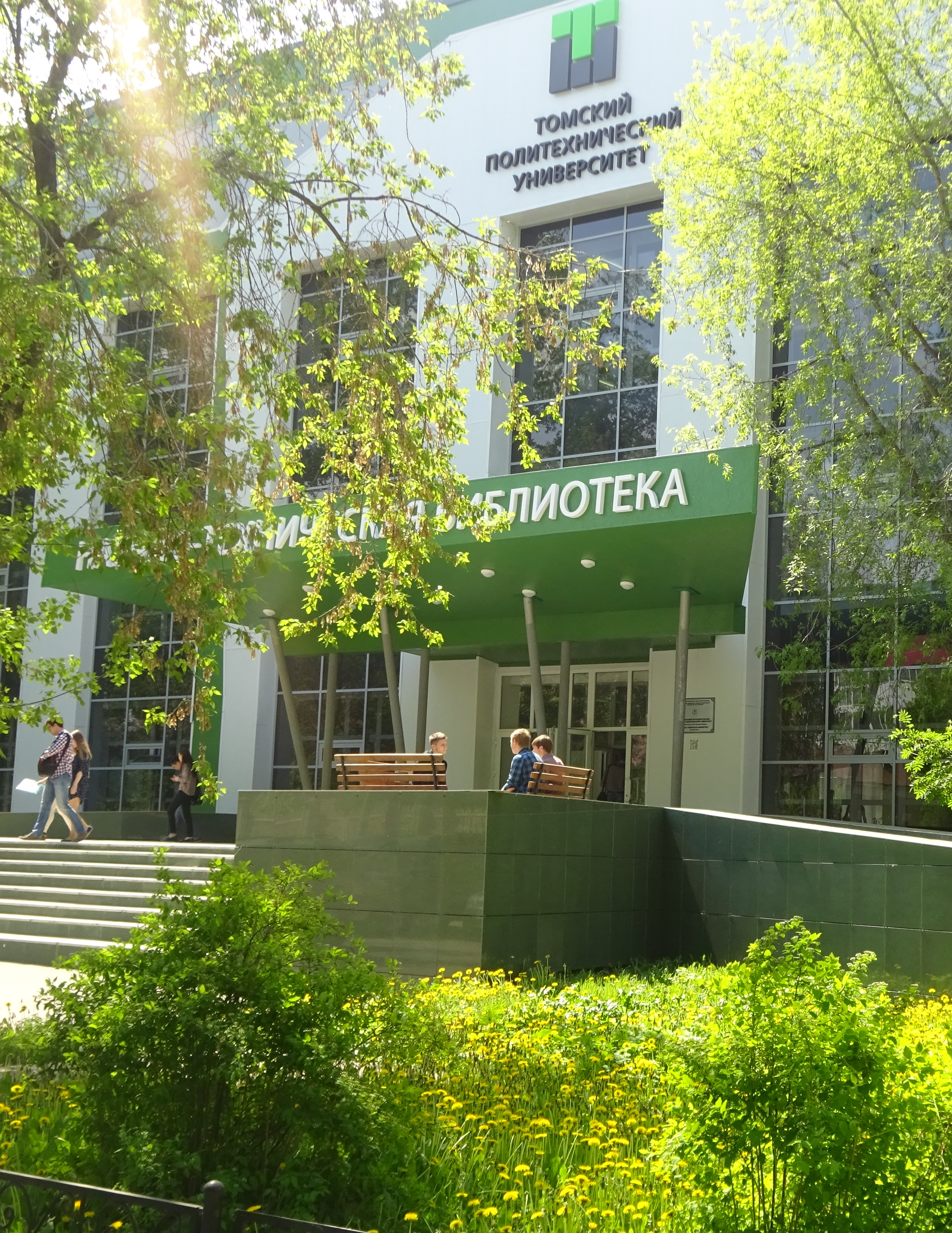 Научно-техническая библиотека ТПУ